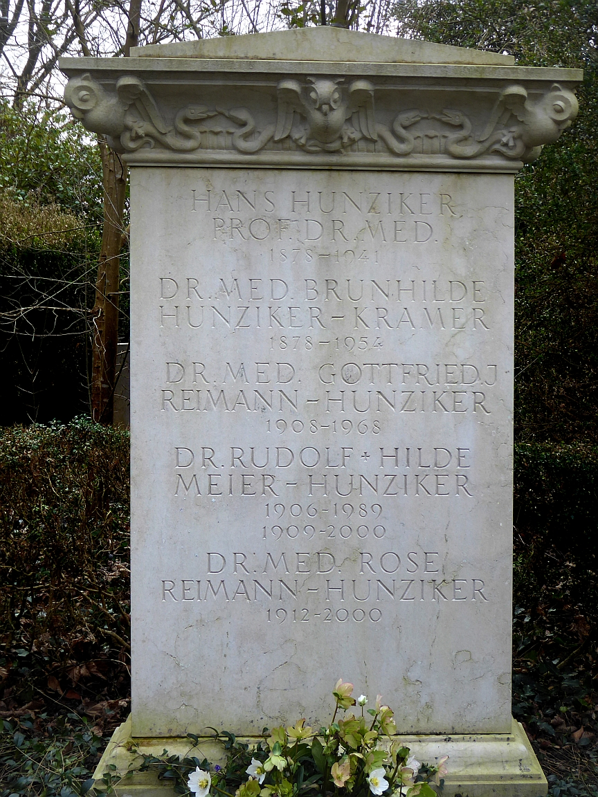 Rose Reiman-Hunziker (1912–2000) Dr.med., Frauenärztin, Gynäkologie und Geburtshilfe, Familiengrab auf dem Friedhof Hörnli, Riehen, Basel-Stadt